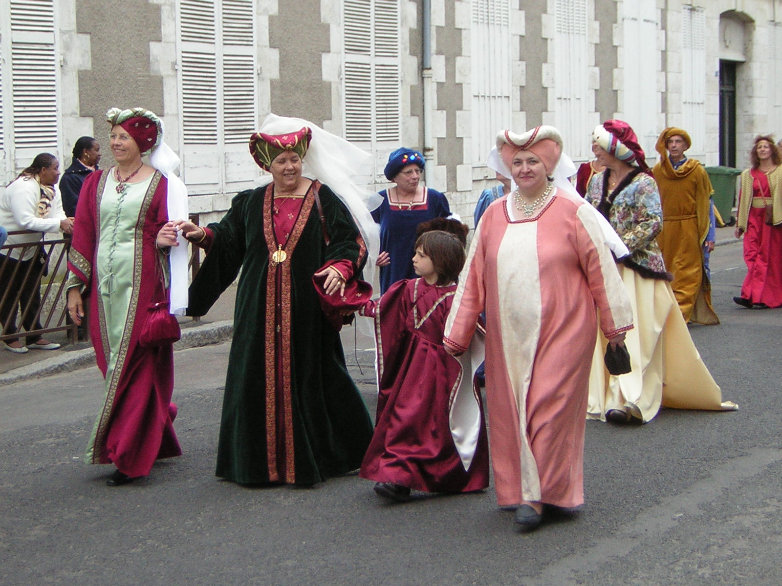 Fêtes de Jeanne d'Arc à Orléans (Loiret)